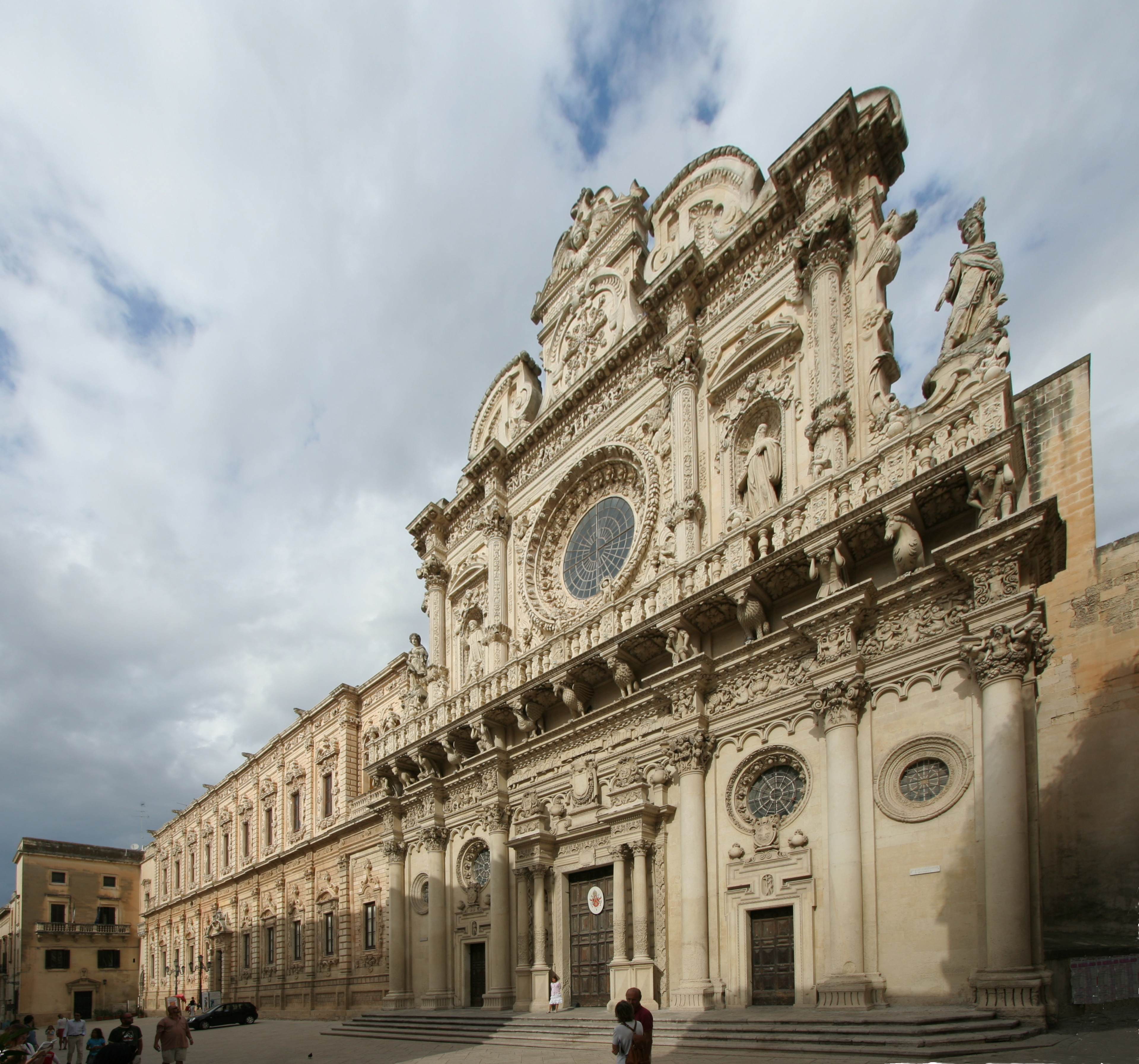 Santa Croce Basilica, Lecce